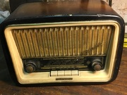 Tale modello fu il primo della serie ad essere equipaggiato di un modulatore di frequenza e della doppia banda sia per le onde corte che per le onde medie.